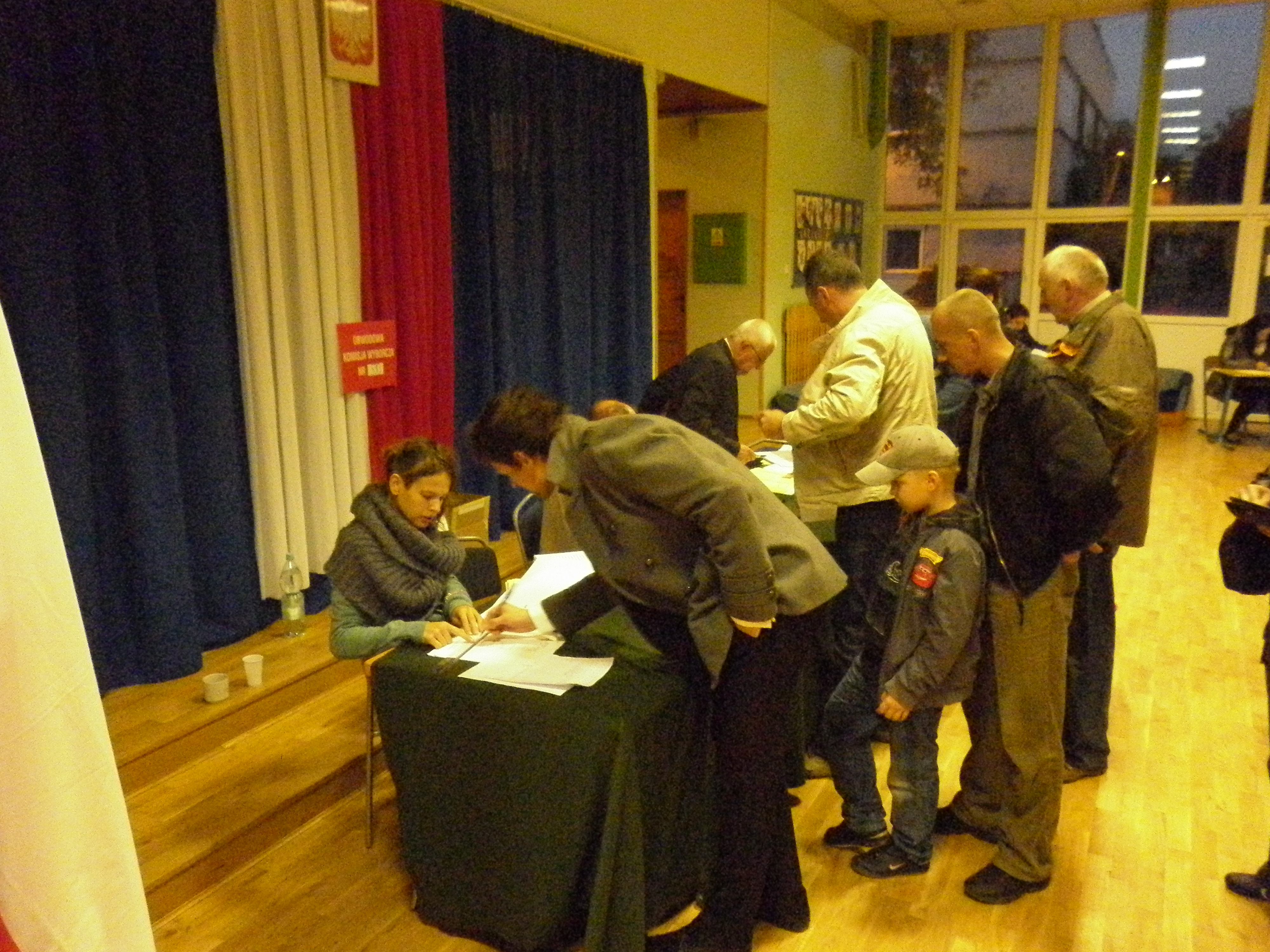 Obwodowa Komisja Wyborcza na Ursynowie